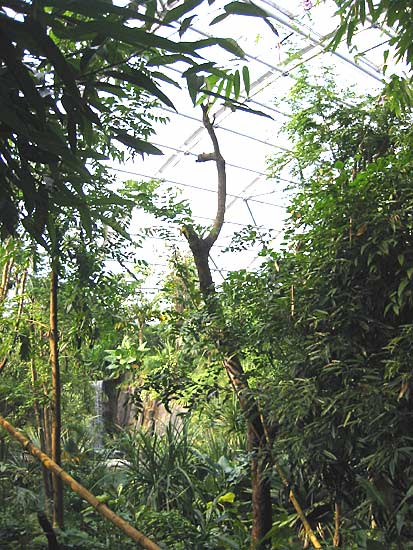 Blick durch die Masoala-Halle im Zoo Zürich auf den künstlichen Wasserfall.